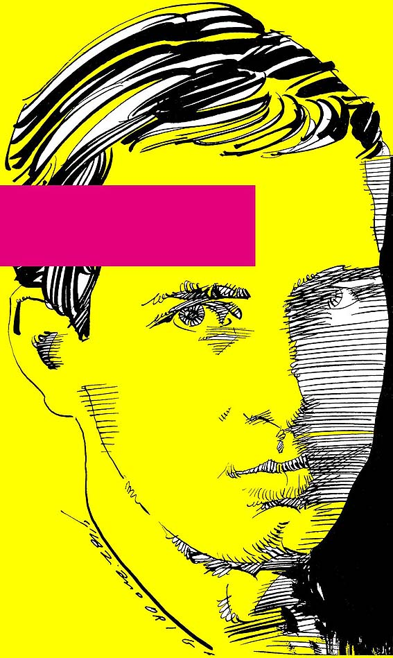 Pier Vittorio Tondelli, ritratto di Graziano Origa per il mensile Babilonia, pennino & china + pantone giallo, 1992